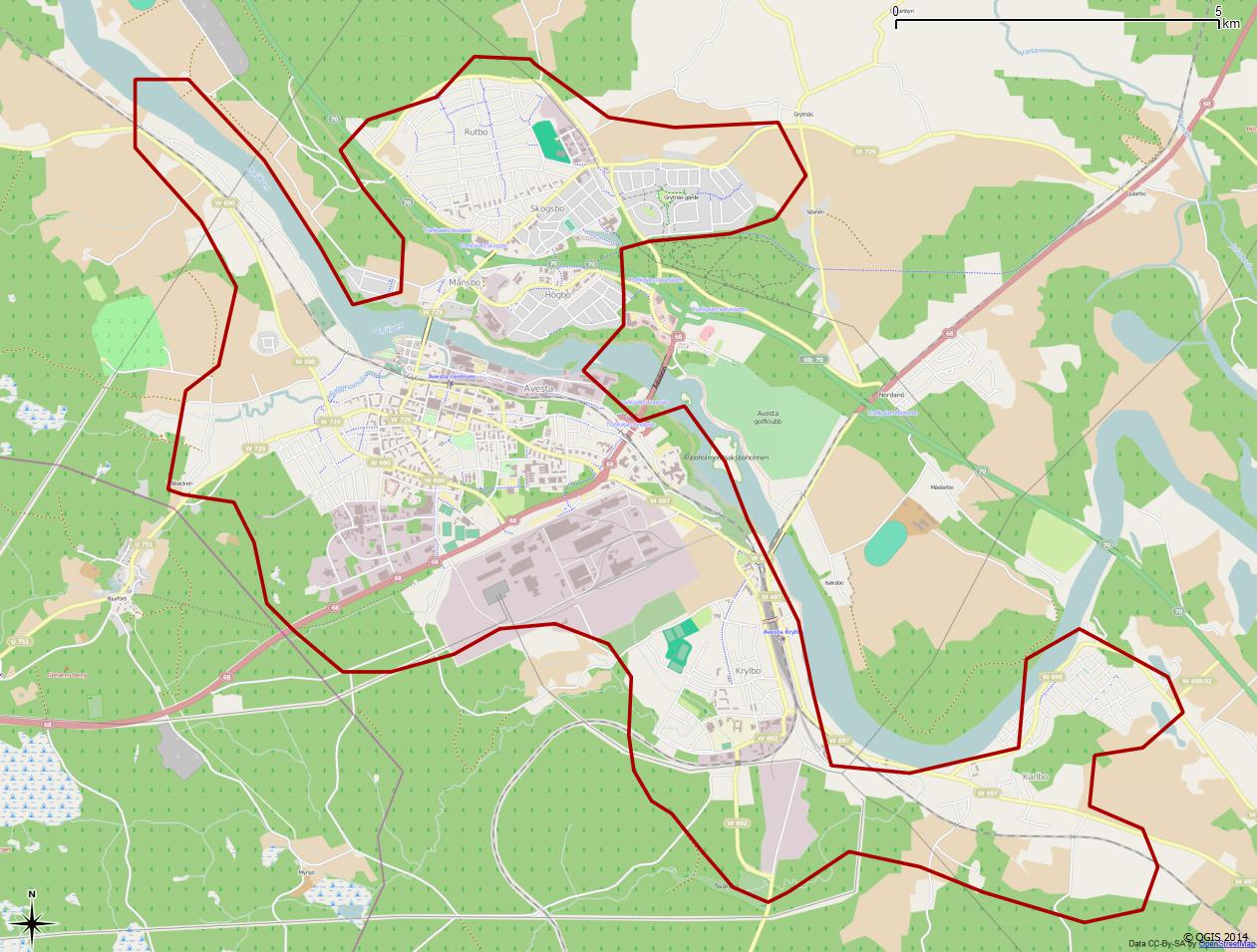 Tätorten Avestas gränser 1990 enligt Atlas över rikets indelningar 1992.